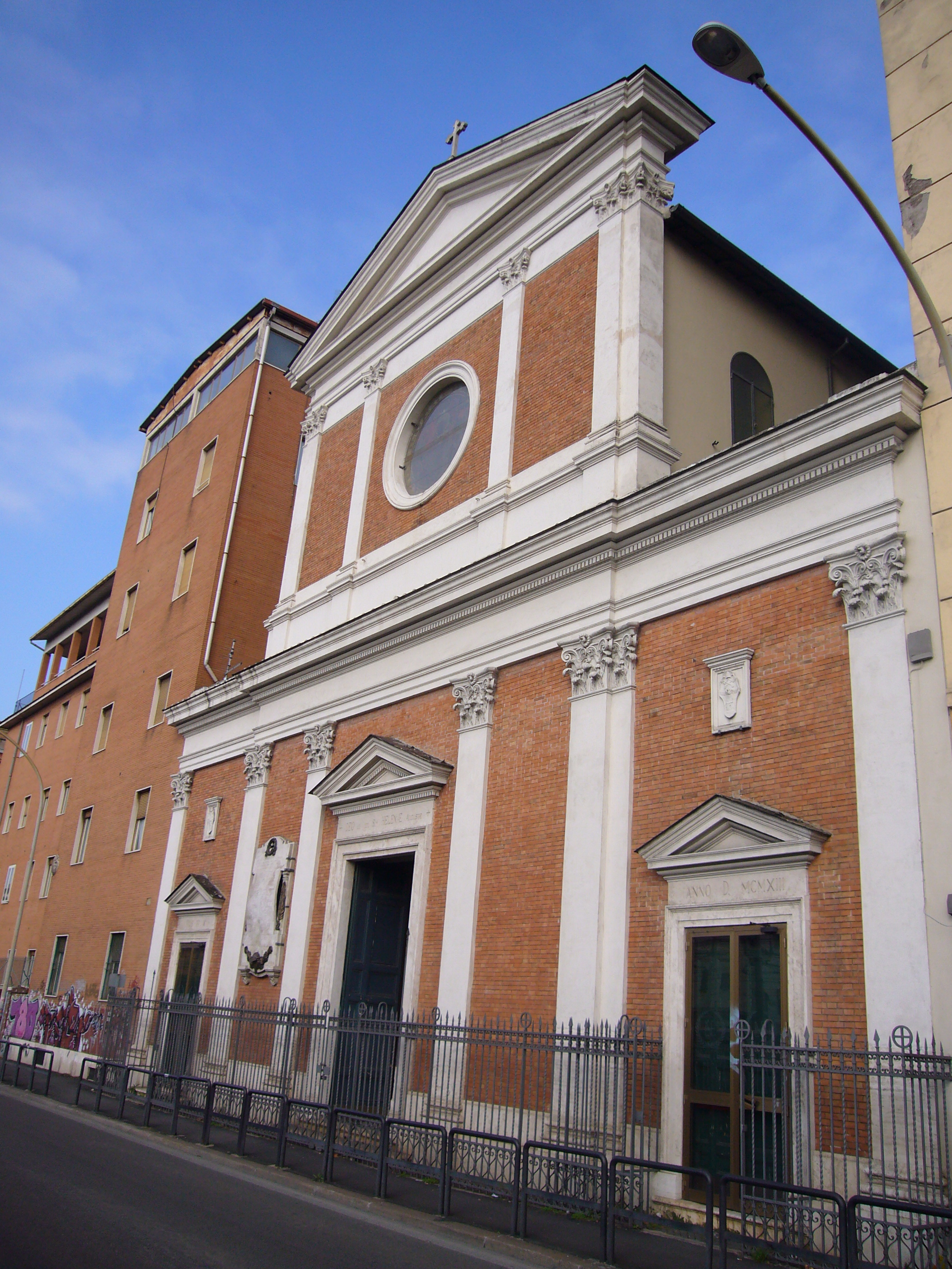 Roma, Sant'Elena fuori Porta Prenestina al Pigneto (quartiere Q.VII, Prenestino-Labicano)